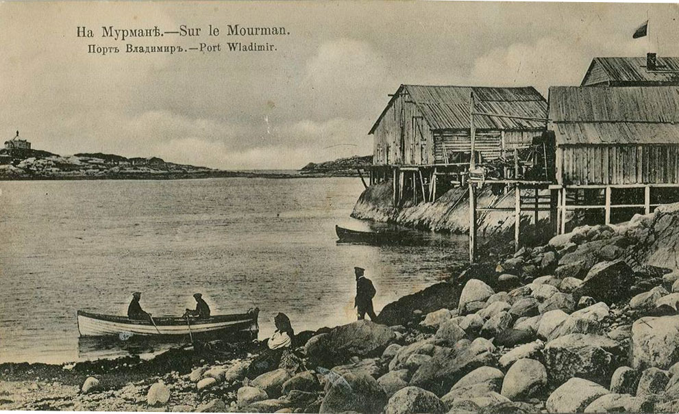 Порт-Владимир, начало XX века